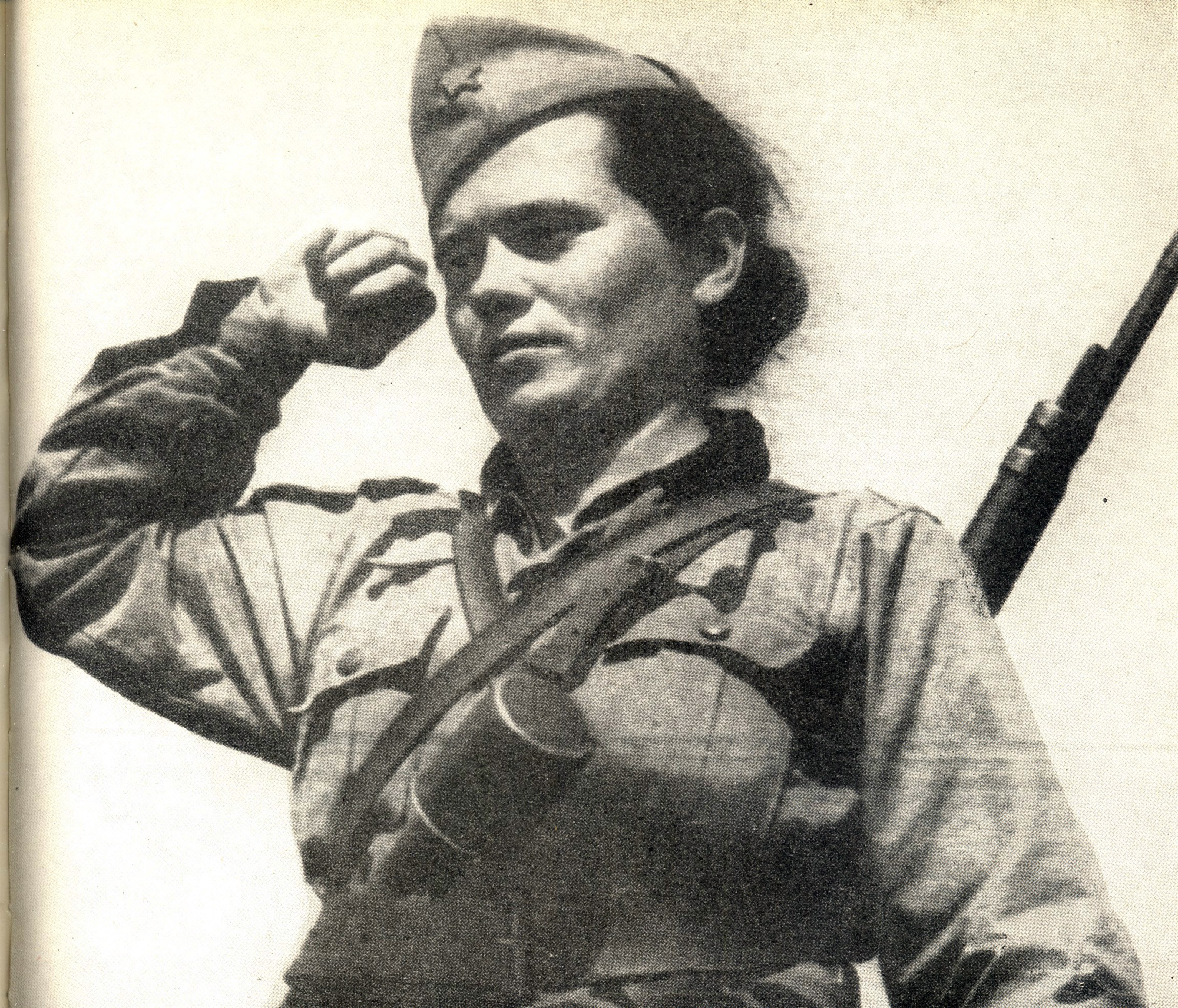 Srpskohrvatski / српскохрватски: Savka Javorina kao partizanka tokom drugog svetskog rata u Jugoslaviji.